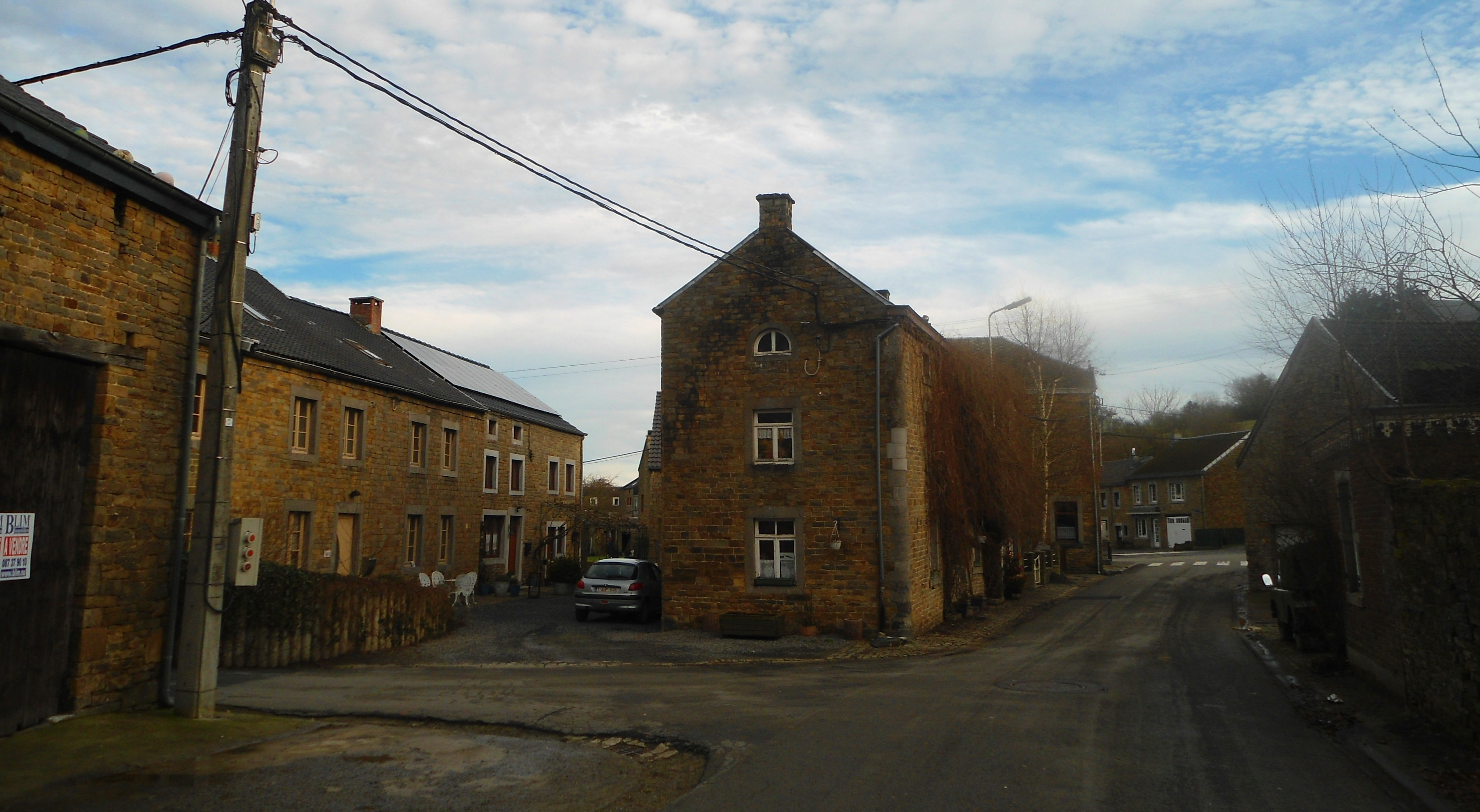 Village d'Oneux Comblain-au-Pont Maisons en grès